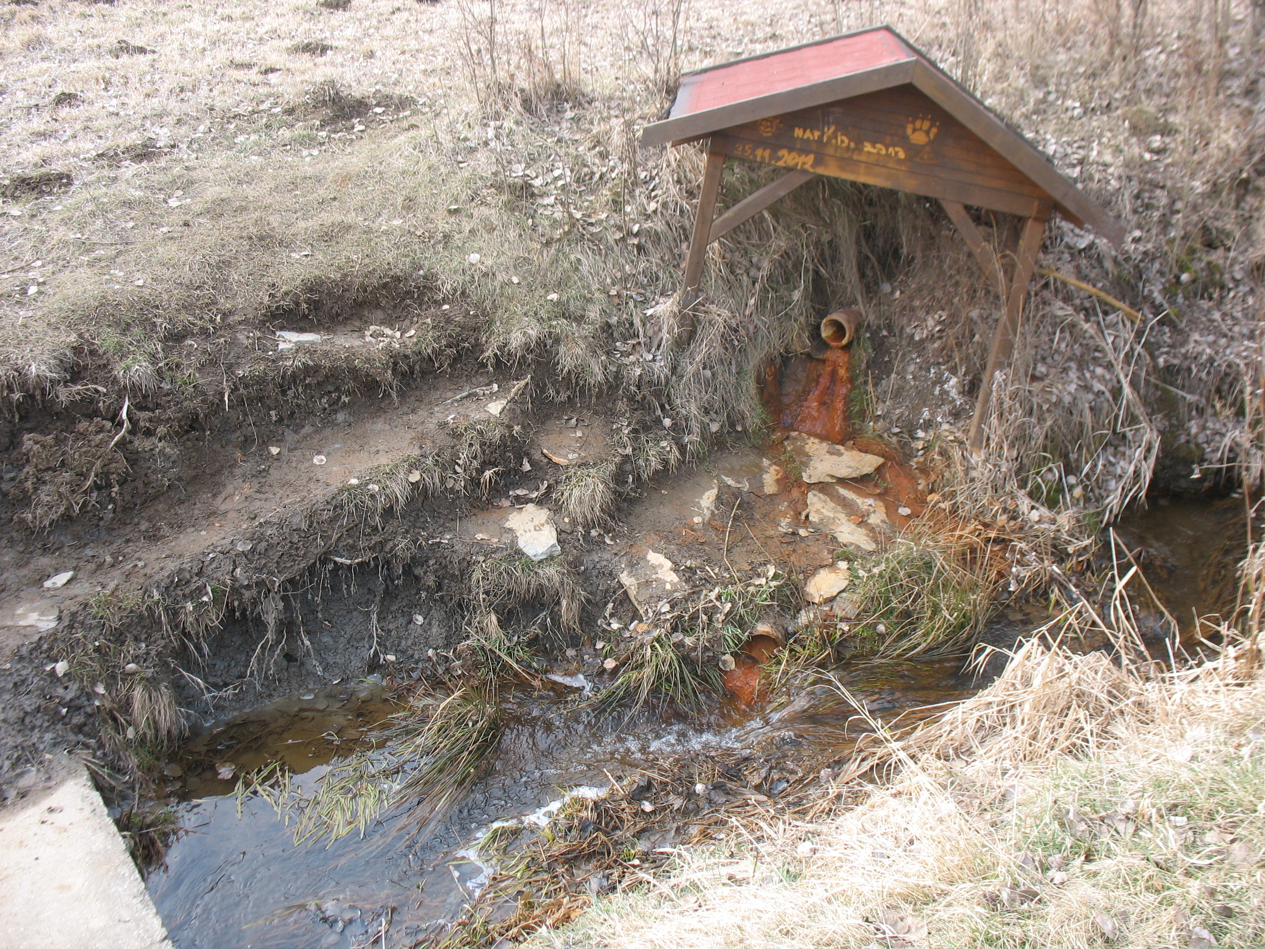 Quelle "Studánka Lásky" im Ort "Břetislav (Konstantinovy Lazne)", Tschechien